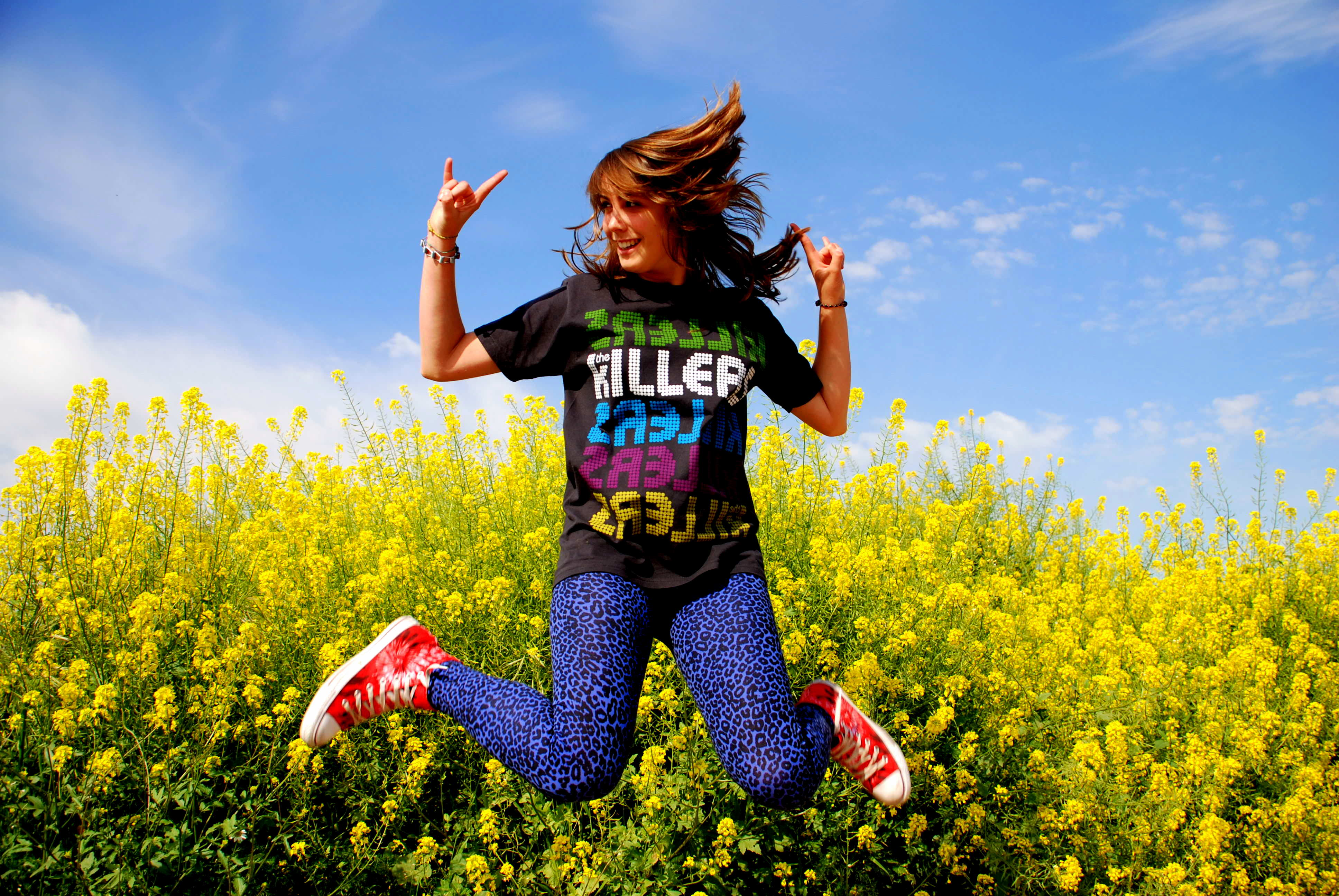 Spring's rock's teen / Rockera de Primavera